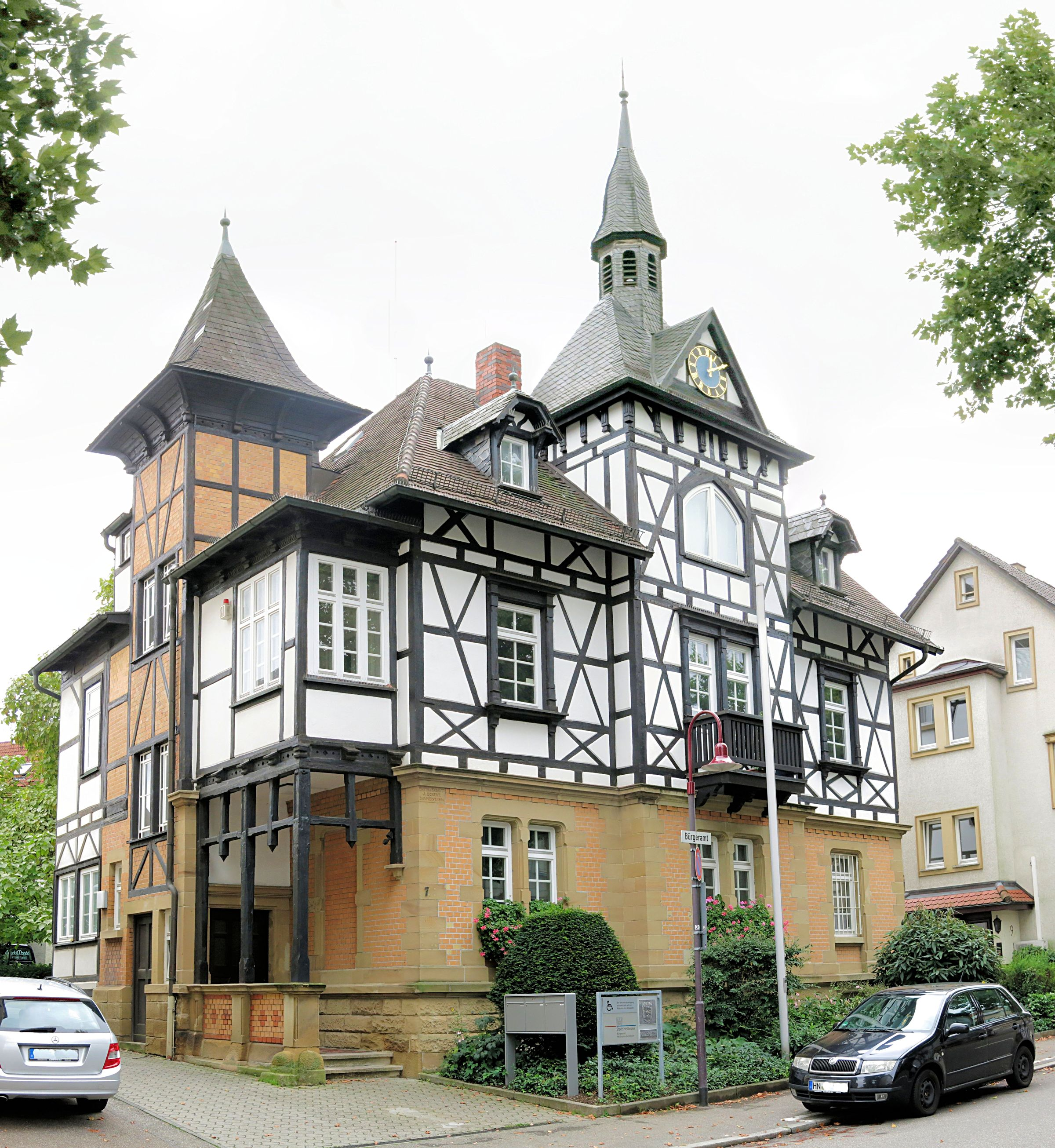 Altes Rathaus in Heilbronn-Sontheim in Sontheim_(Heilbronn)